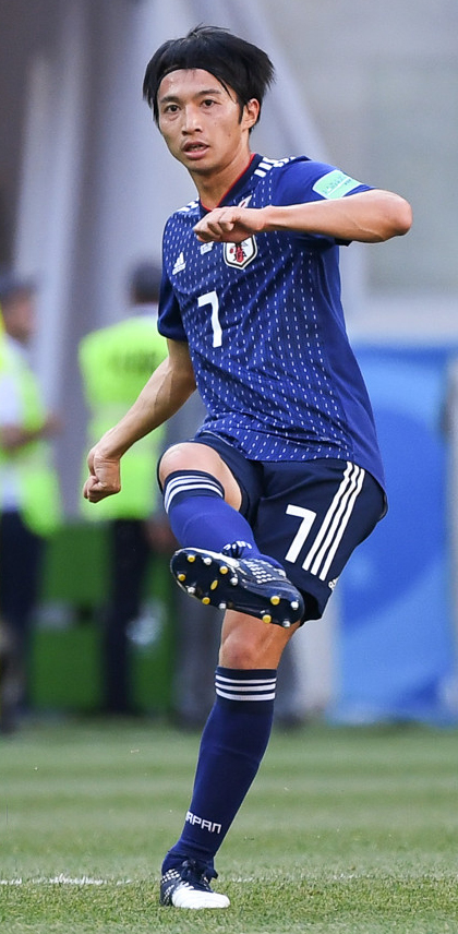 Япония проиграла Польше, но вышла в плей-офф